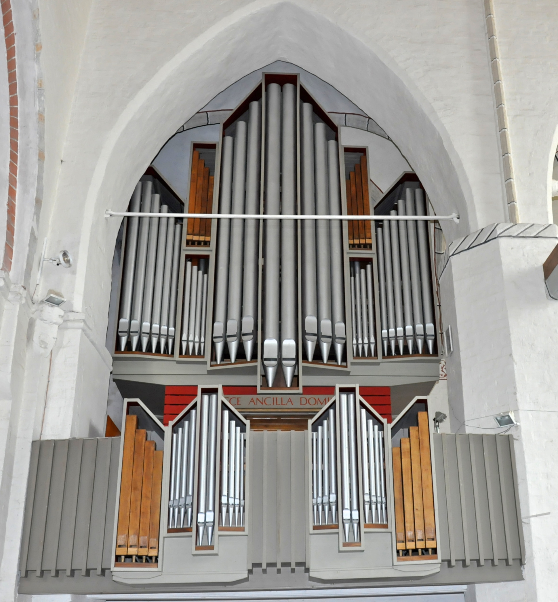 Orgel in Gadebusch, Stadtkirche, Mecklenburg-Vorpommern